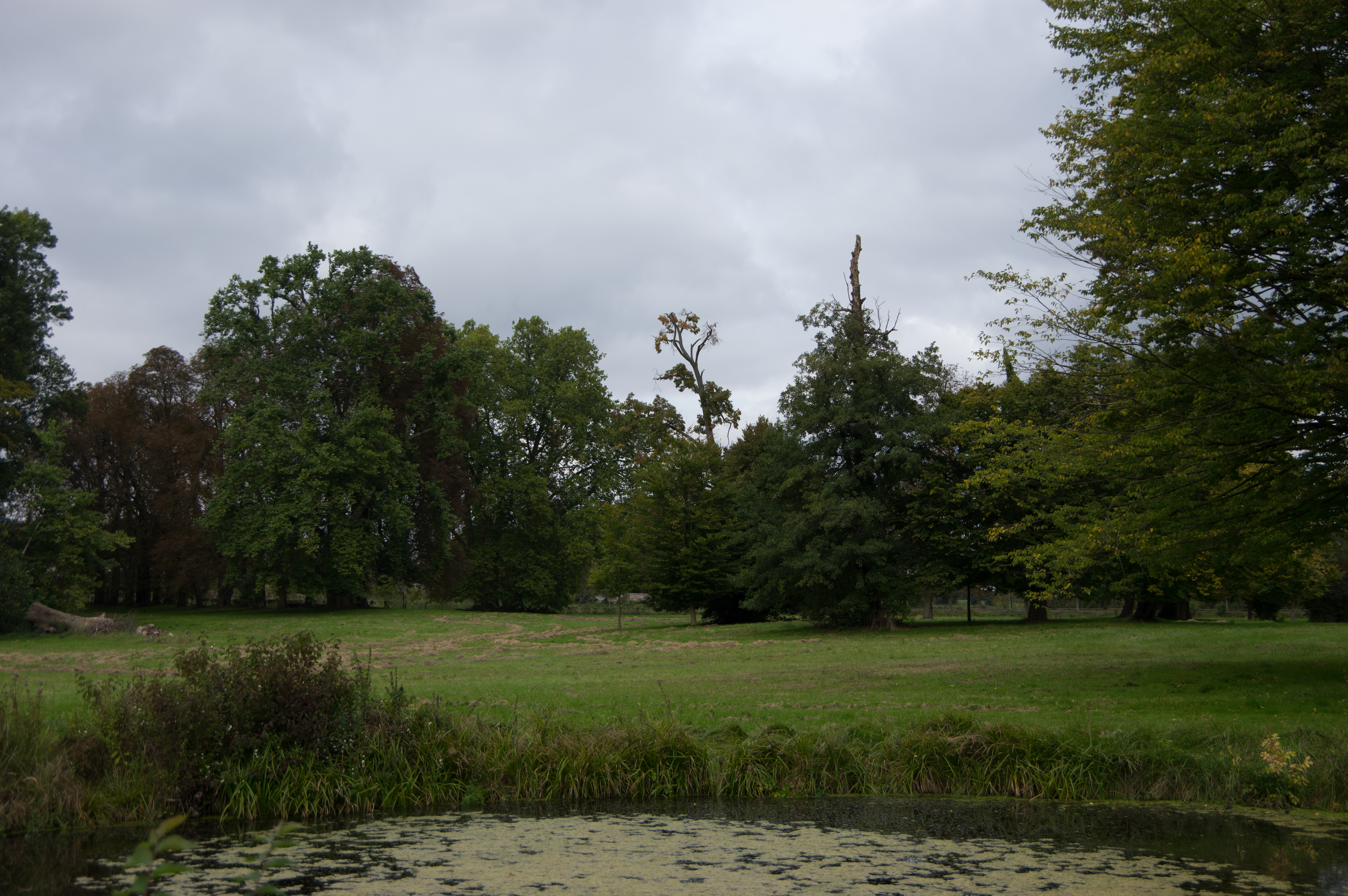 Schwedt/Oder, Ortsteil Criewen in Brandenburg. Der Park ist Teil der Gutsanlage Criewen und wurde ab 1822 nach Plänen von Peter Joseph Lenné errichtet. Teile des Barockgarten wurden mit einbezogen.